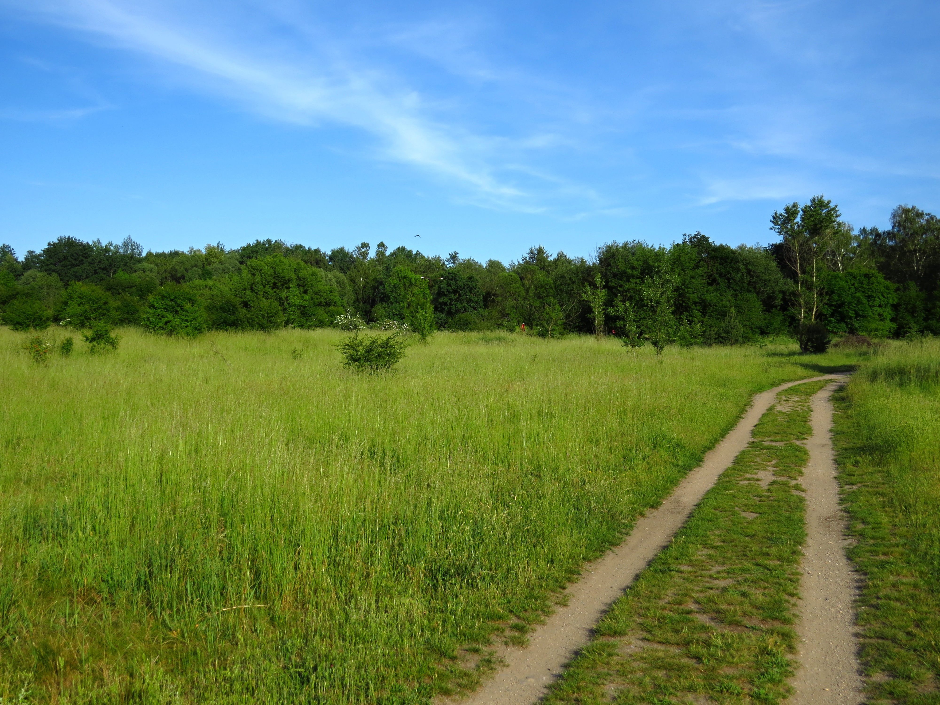 PP Na Plachtě